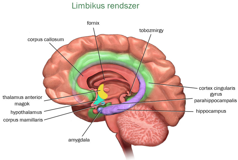 Főbb részei